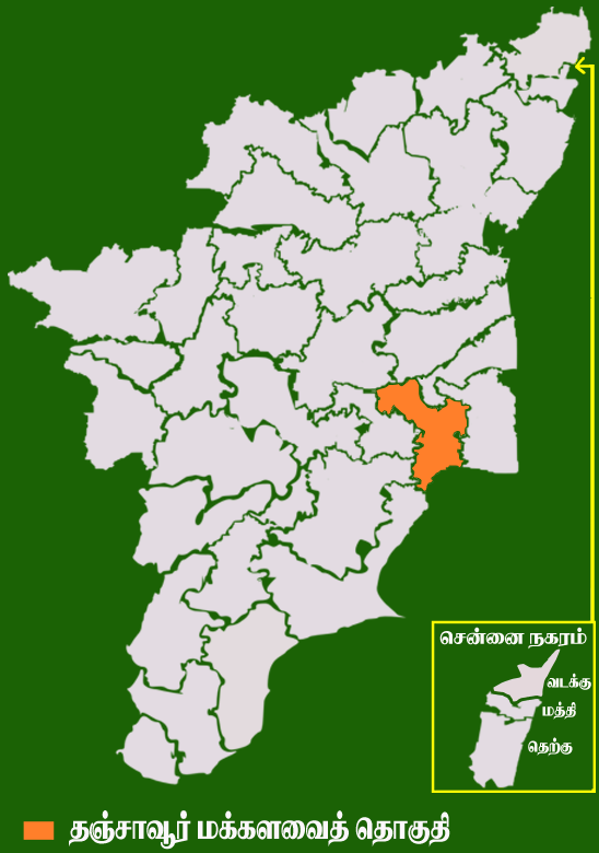 தமிழக வரைபடத்தில் உள்ள தஞ்சாவூர் மக்களவைத் தொகுதி